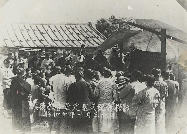 中文（台灣）: 巴克禮牧師26歲即來台，亦於當時決定將一生奉獻給台灣，他相信這是上帝給他的使命。圖中是巴克禮牧師於1935年應邀主持旗後教會會堂定基式典禮，帶領教友們一同朗誦經文。